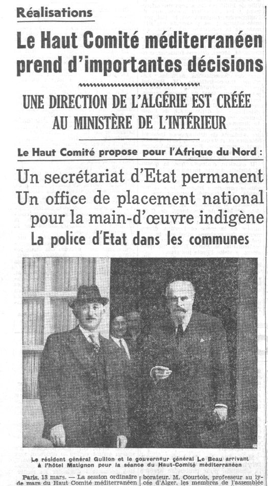 Article de "L'Écho d'Alger " sur le Haut-Comité méditerranéen, 14 mars 1937.